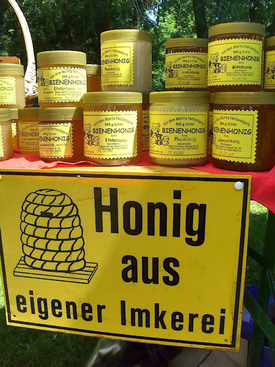 Honigdirektverkauf und Werbeschild für "Honig aus eigener Imkerei" (hier von einer Imkerin in Mecklenburg-Vorpommern, Deutschland).